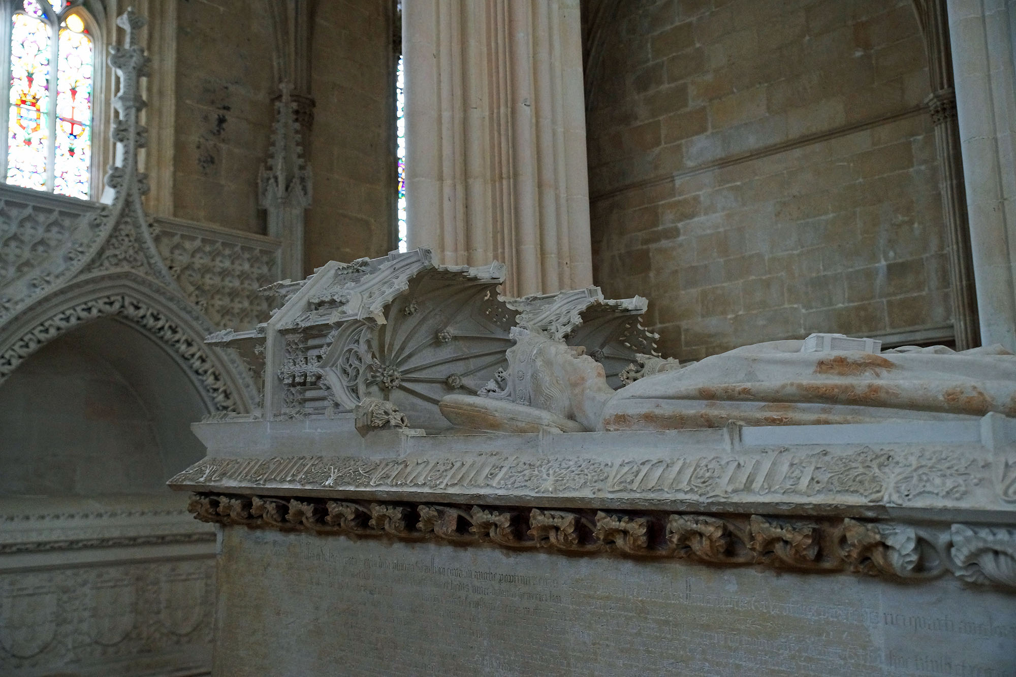 BATALHA, Portugal BATALHA (Wiki): BATALHA Kloster (Wiki)